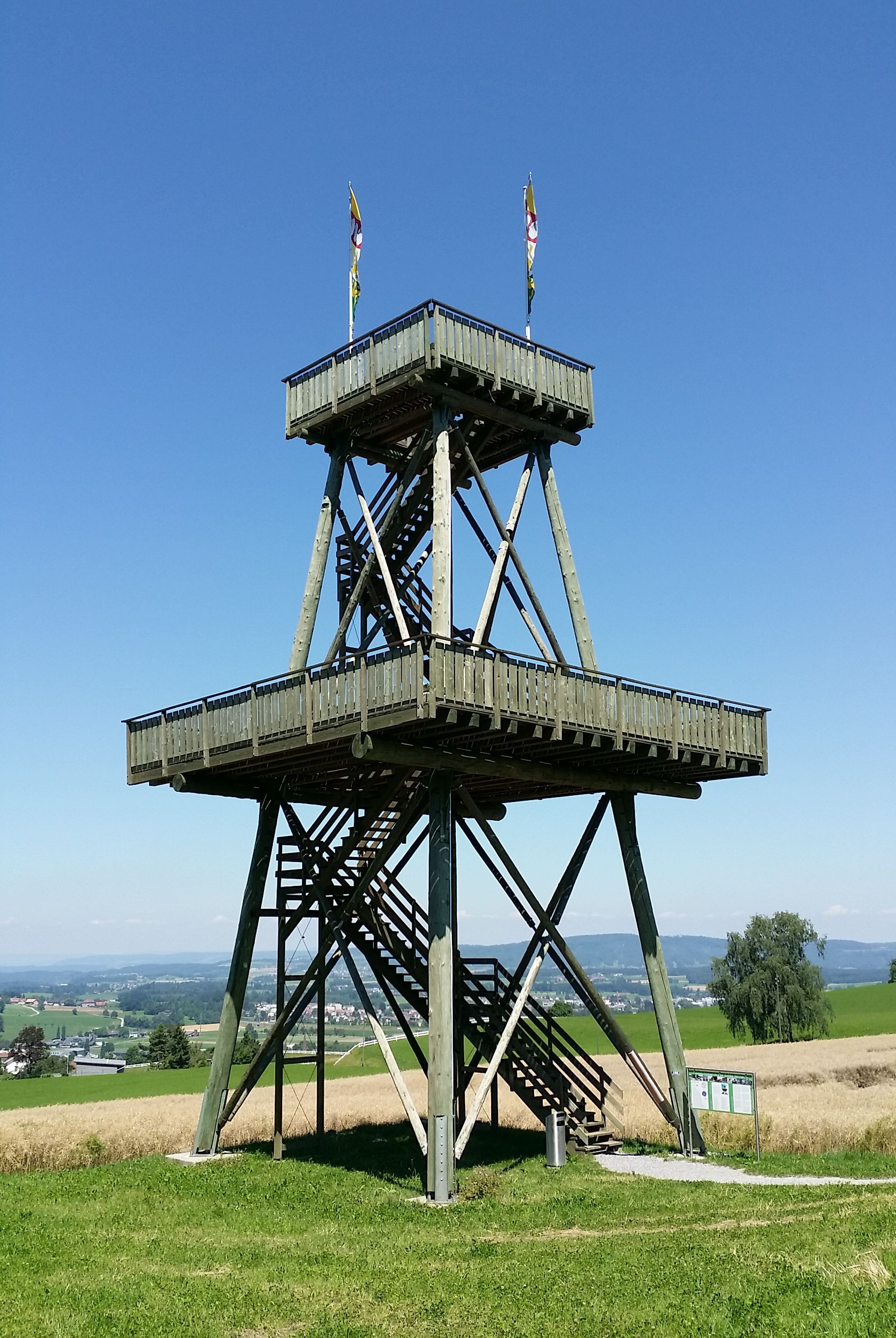 JuBla Turm Sirnach